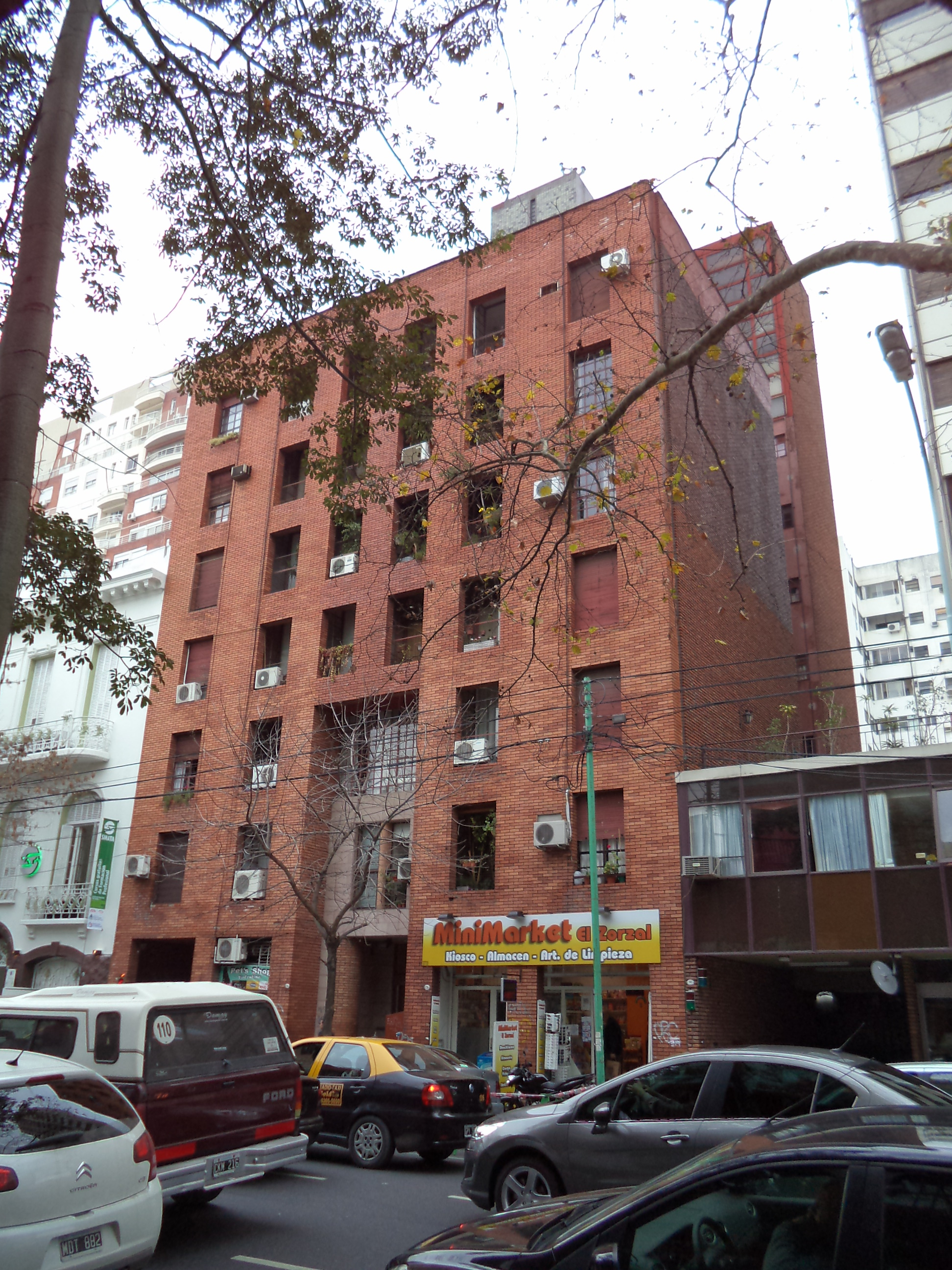 Fachada del edificio en Medrano 172, ciudad de Buenos Aires.